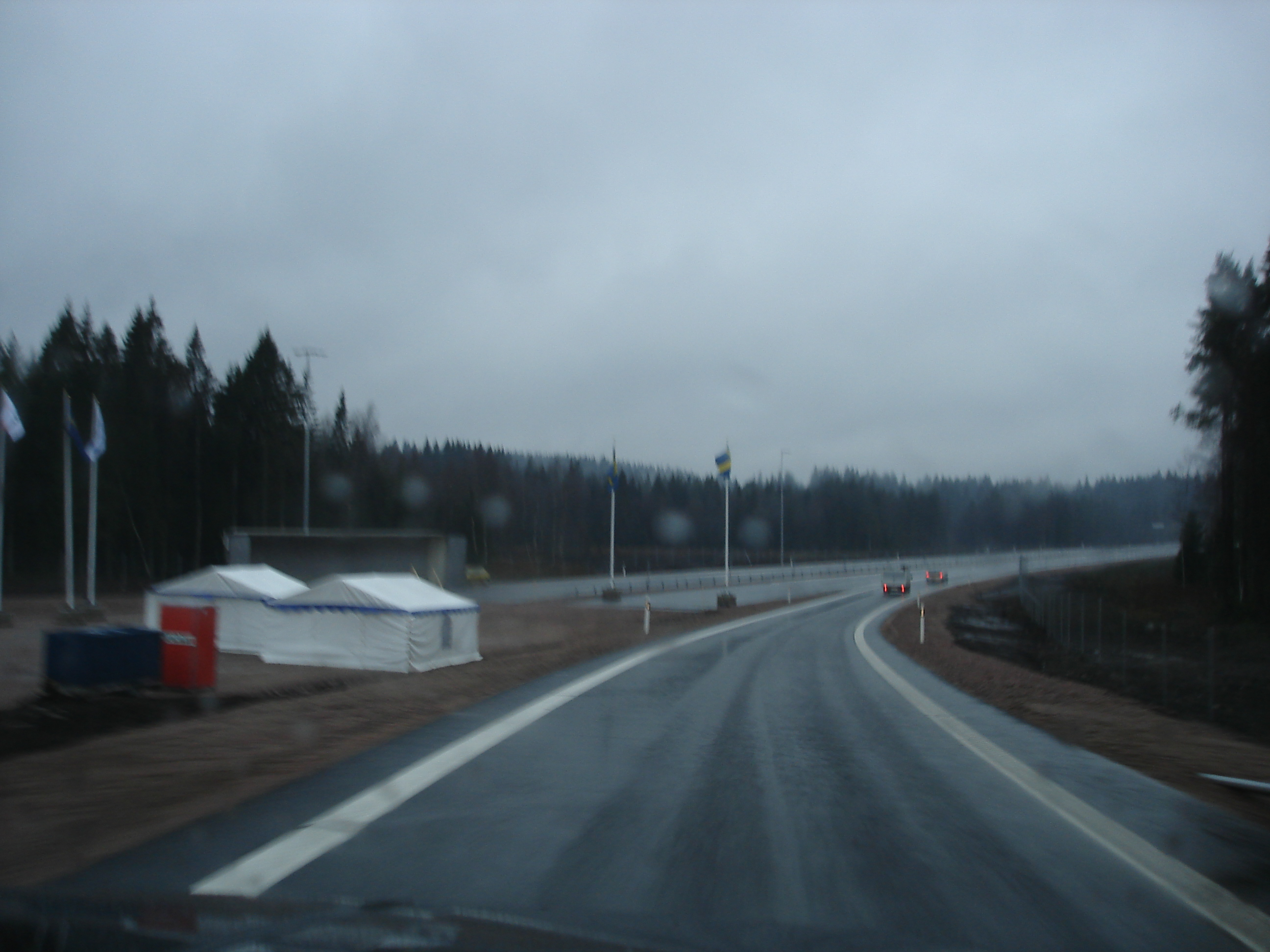 National Road 40, junction Dalsjöforsmotet in Sweden. Riksväg 40 vid trafikplats Dalsjöforsmotet. Mellan den 25 november 2006 och hösten 2007 börjar/slutar motorvägen vid Dalsjöforsmotet. Som synes på bilden är fortsättningen österut ännu inte klar. Photo: Sebbe 2006-11-25